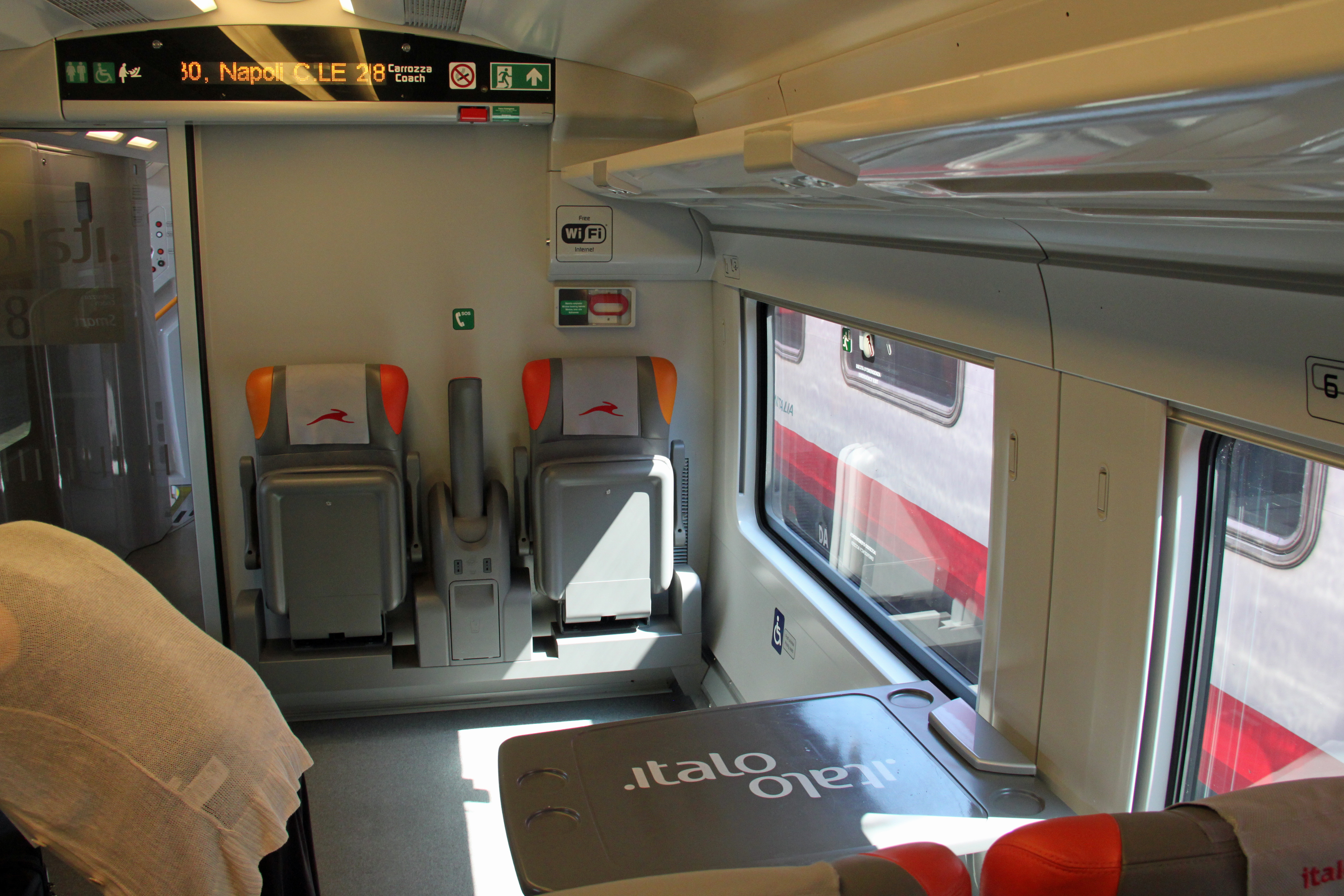 Interieur van de .Italo van NTV, de particuliere hogesnelheidstrein in Italië.